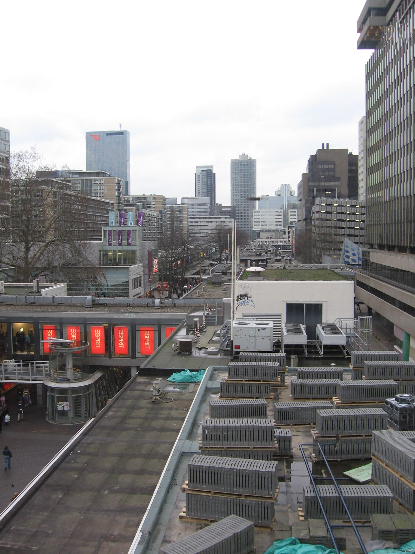 De Lijnbaan gezien vanuit boekhandel Donner. Categorie:Afbeelding straat in Rotterdam